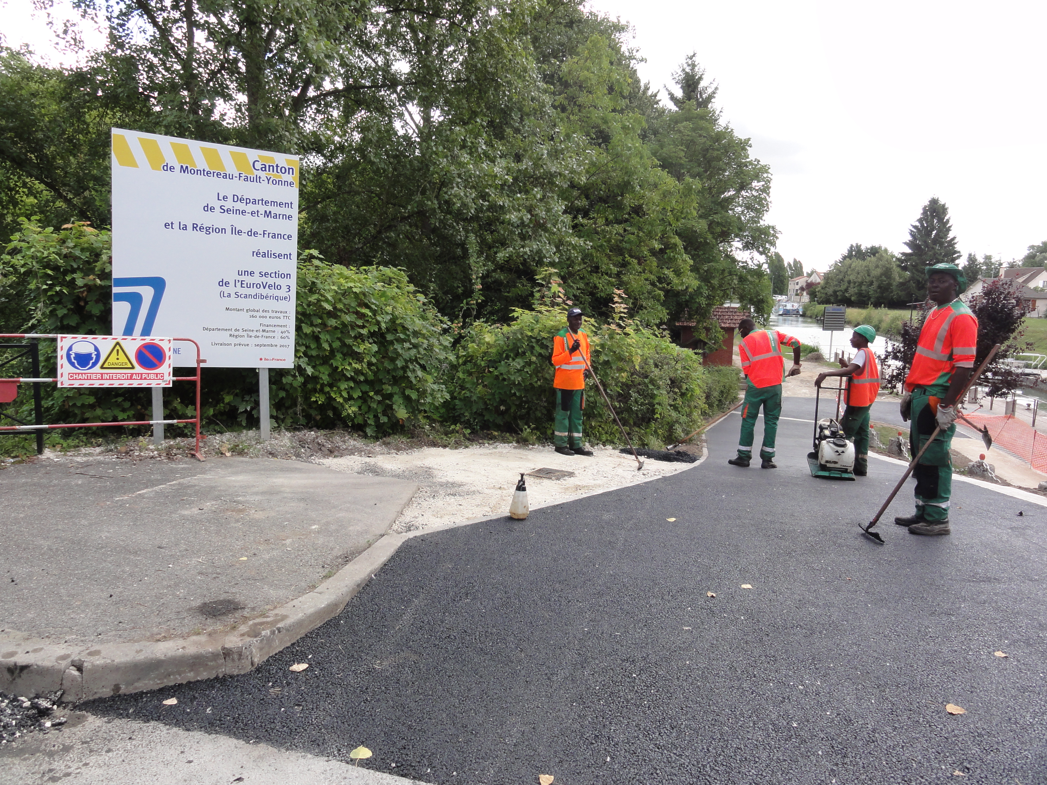 Moret-sur-Loing Véloroute Eurovélo 3 en construction août 2017